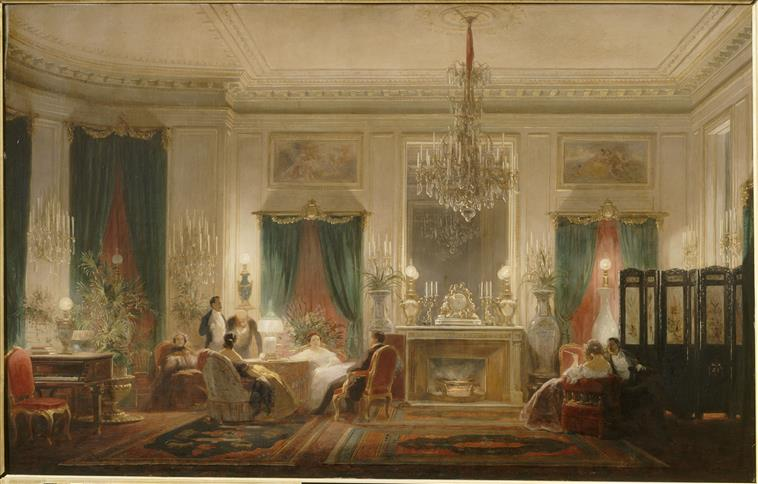 Salon de la Princesse Mathilde - 24 rue de Courcelles, Paris. Musée national du château de Compiègne.